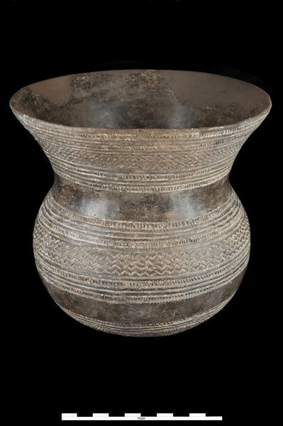 Vaso de Ciempozuelos (Campaniforme). Número de inventario: 32252.